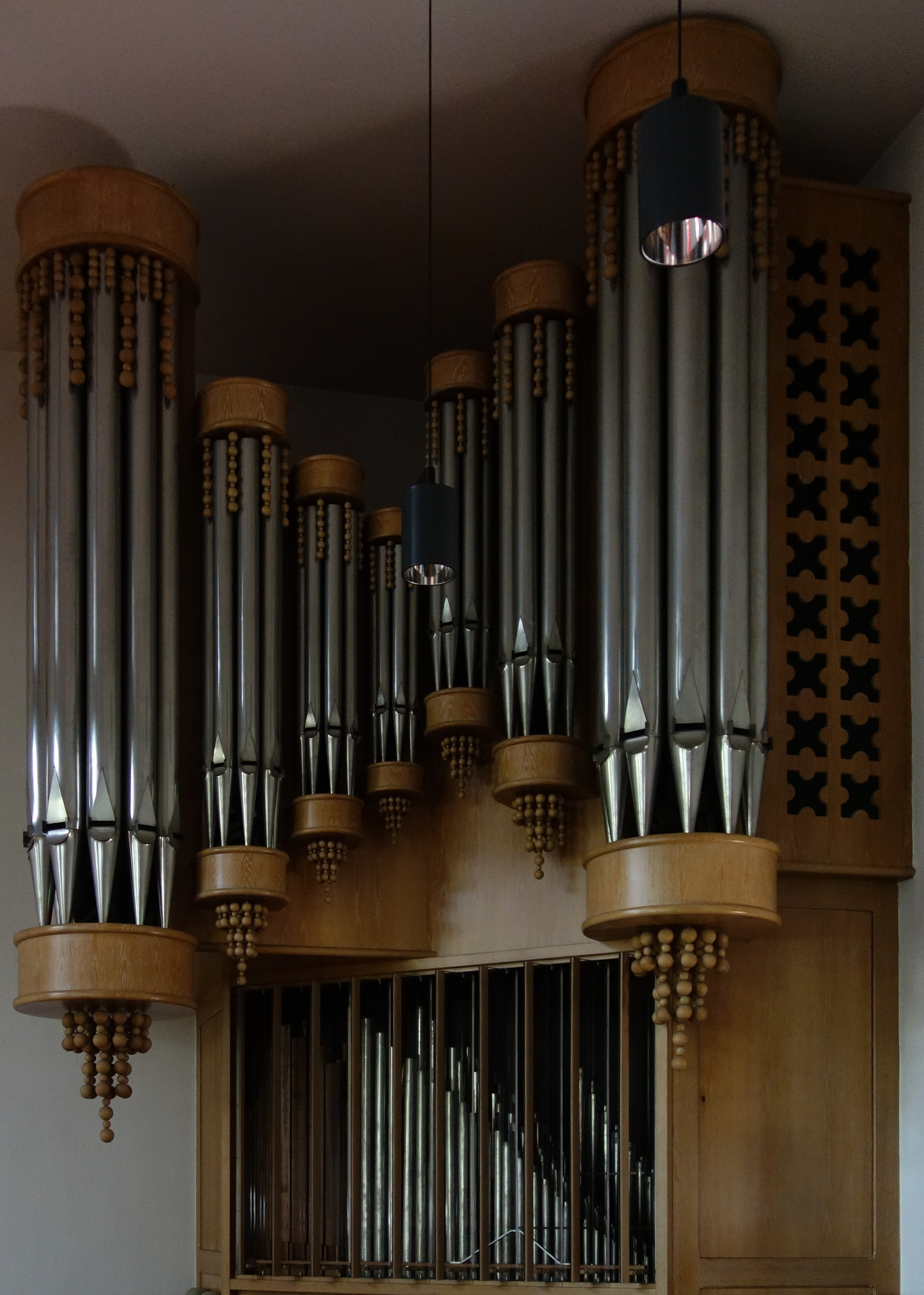 Orgel der Herz-Jesu-Kirche in Bergisch Gladbach-Schildgen